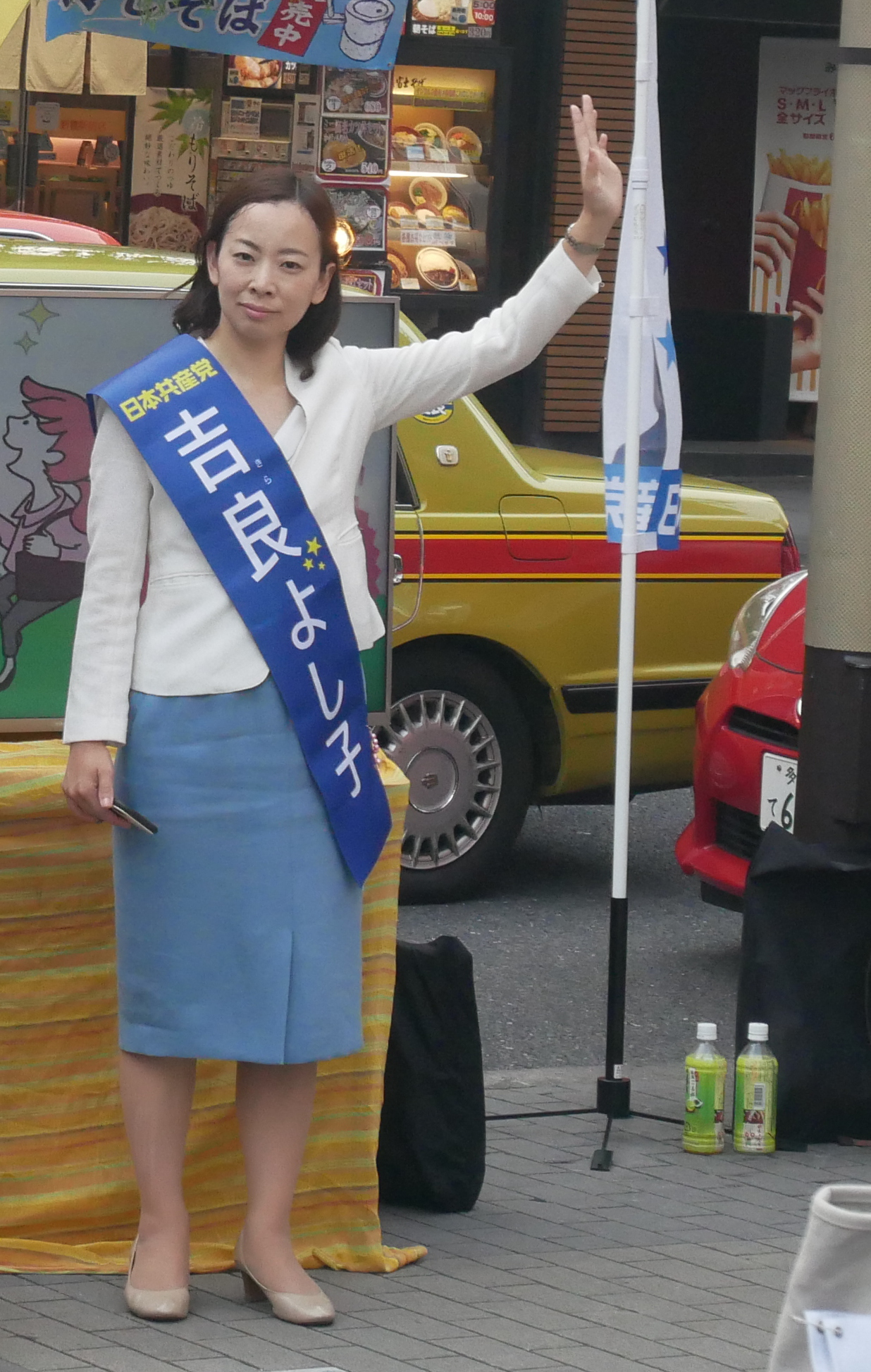 吉良佳子（きら よしこ, Yoshiko Kira)